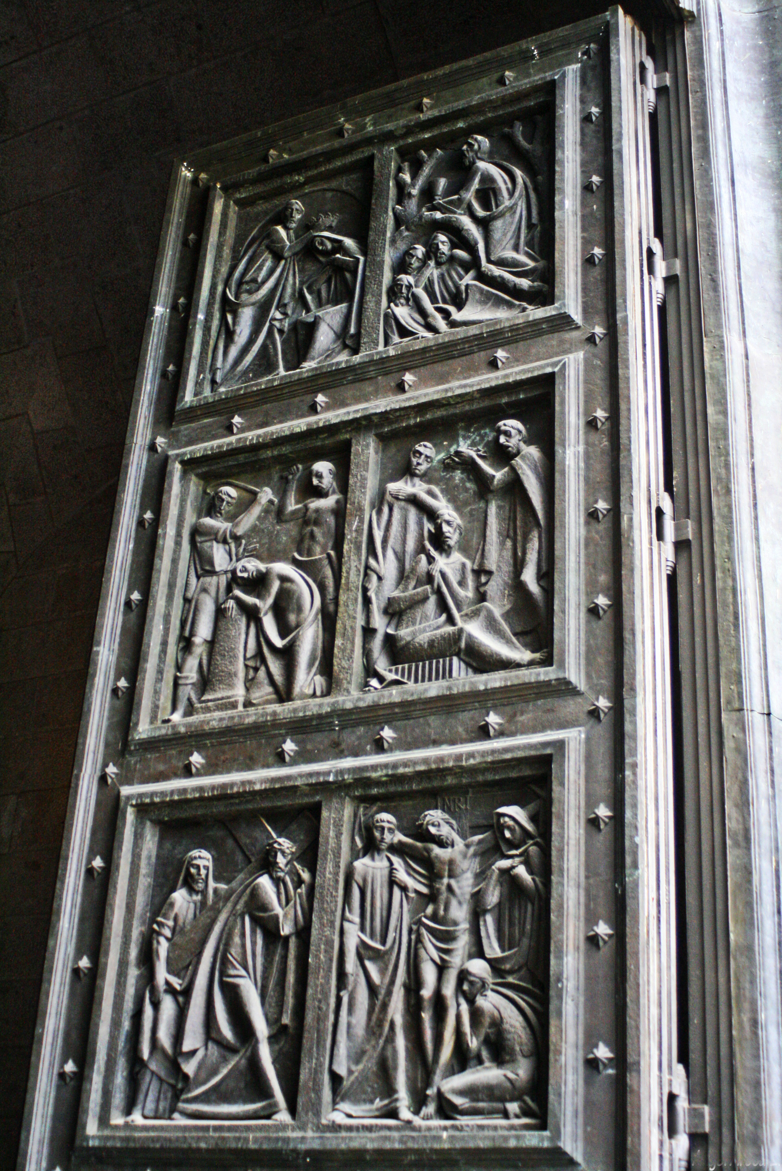 Valle de los Caídos